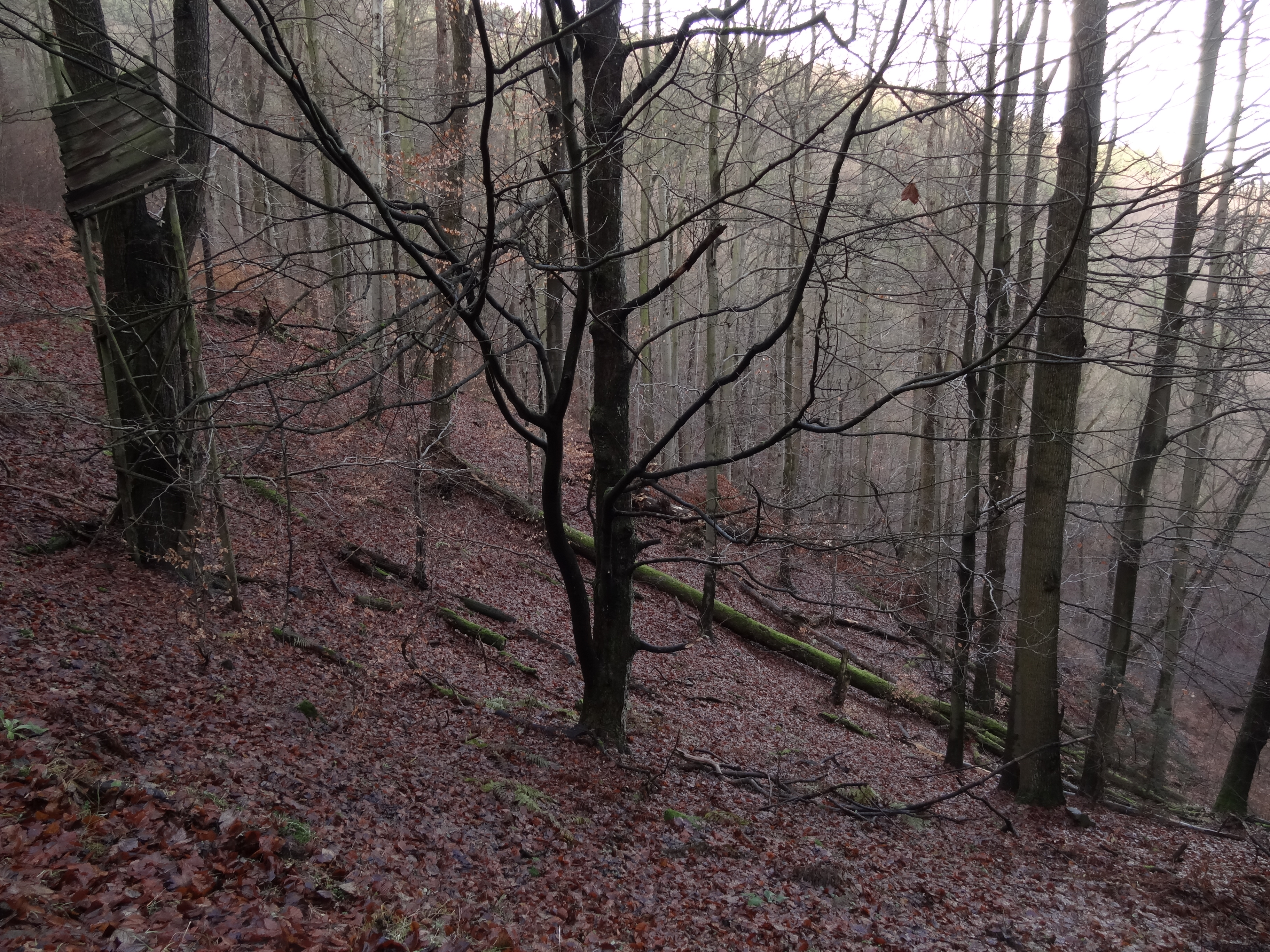 PR Dlouhá hora chrání komplex přirozených společenstev bučin s výskytem chráněných a ohrožených druhů rostlin na východním svahu stejnojmenné hory.